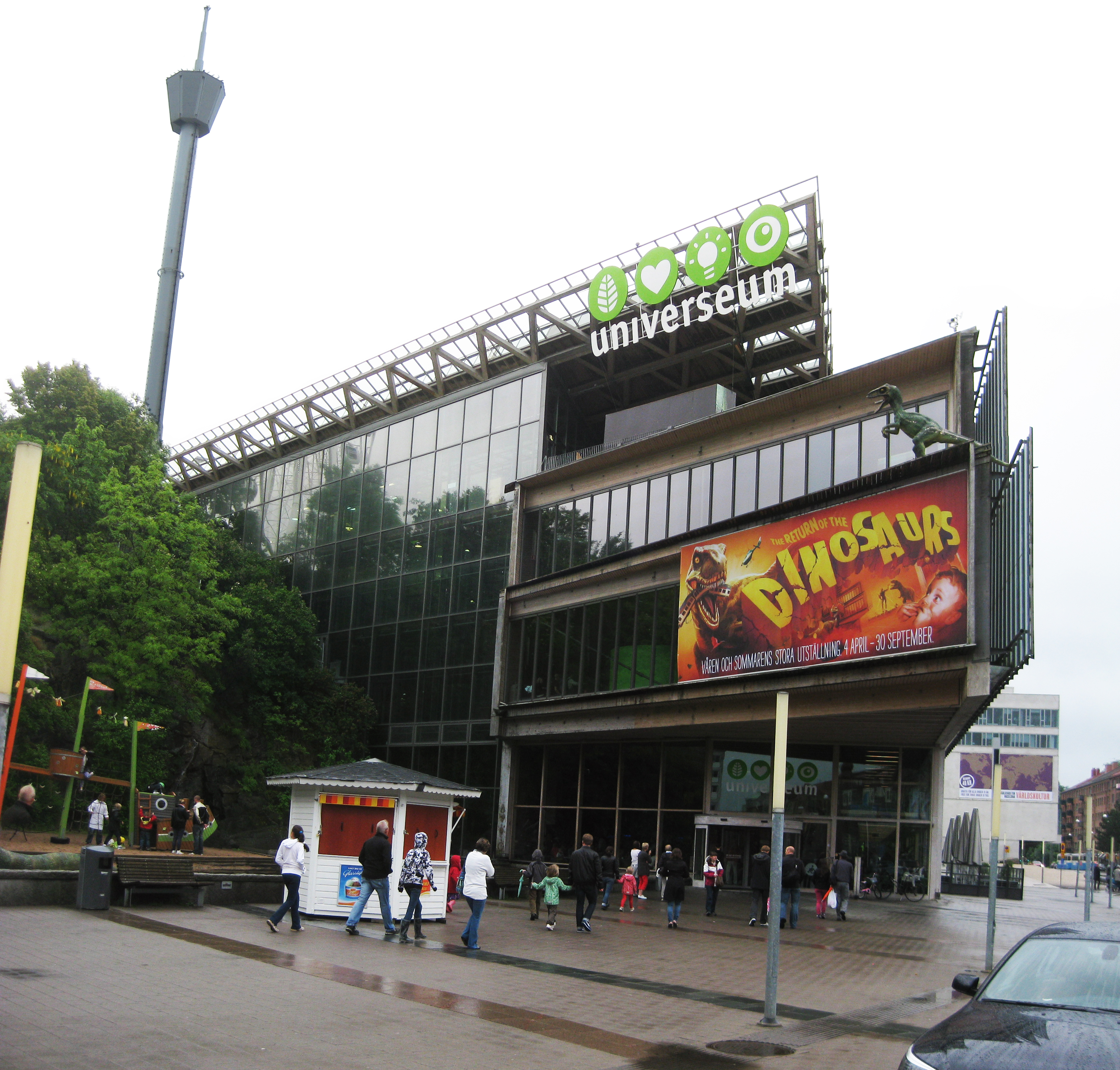 Entrén till Universeum under utställningen "Dinosaurs".